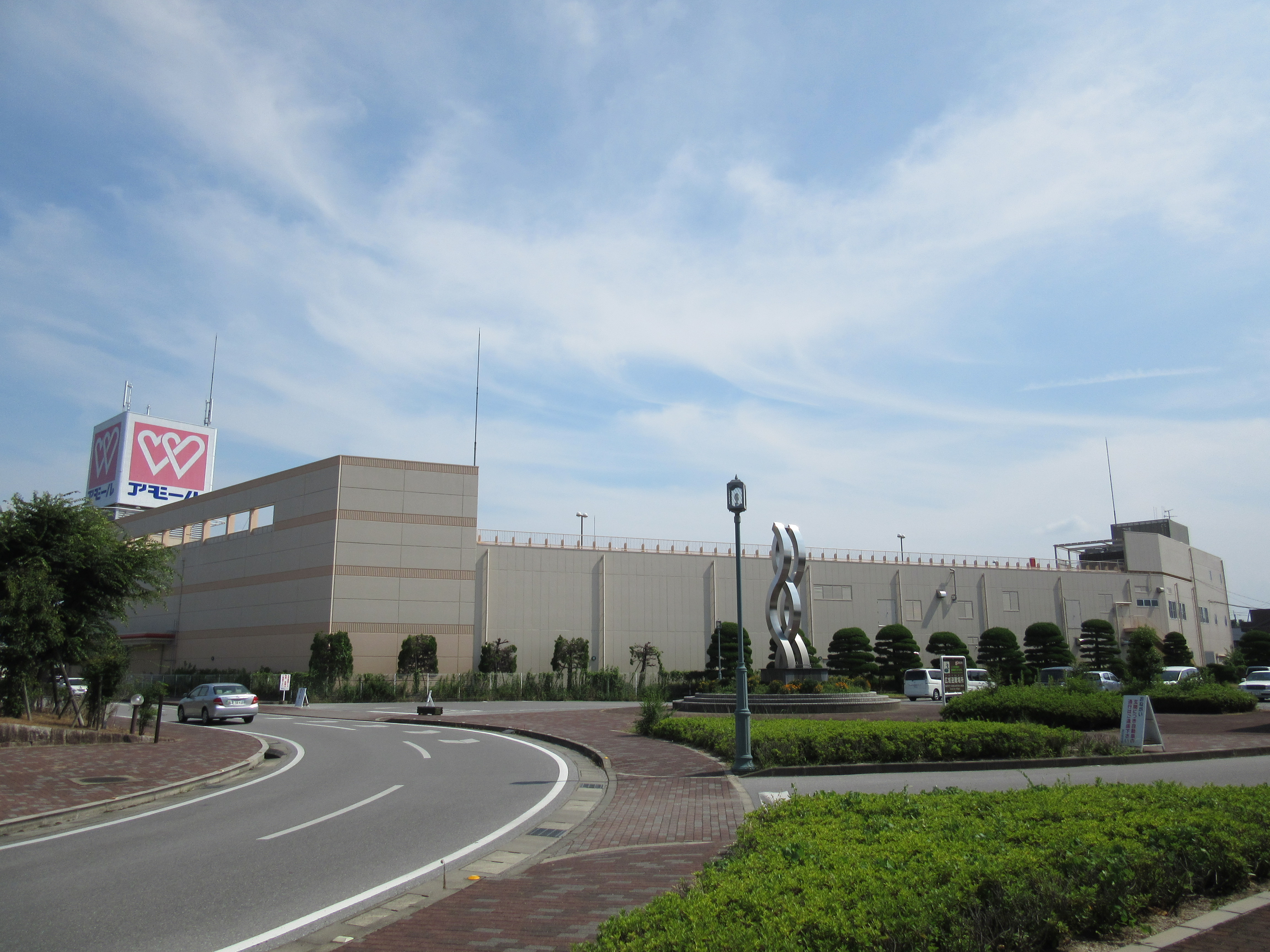 平和堂愛知川店（アモール）